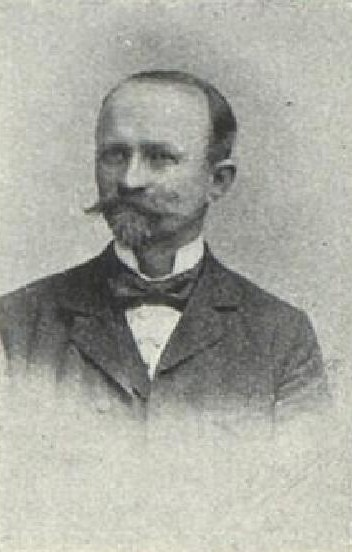 František Trojan (1853-1934), rakouský a český pedagog a politik